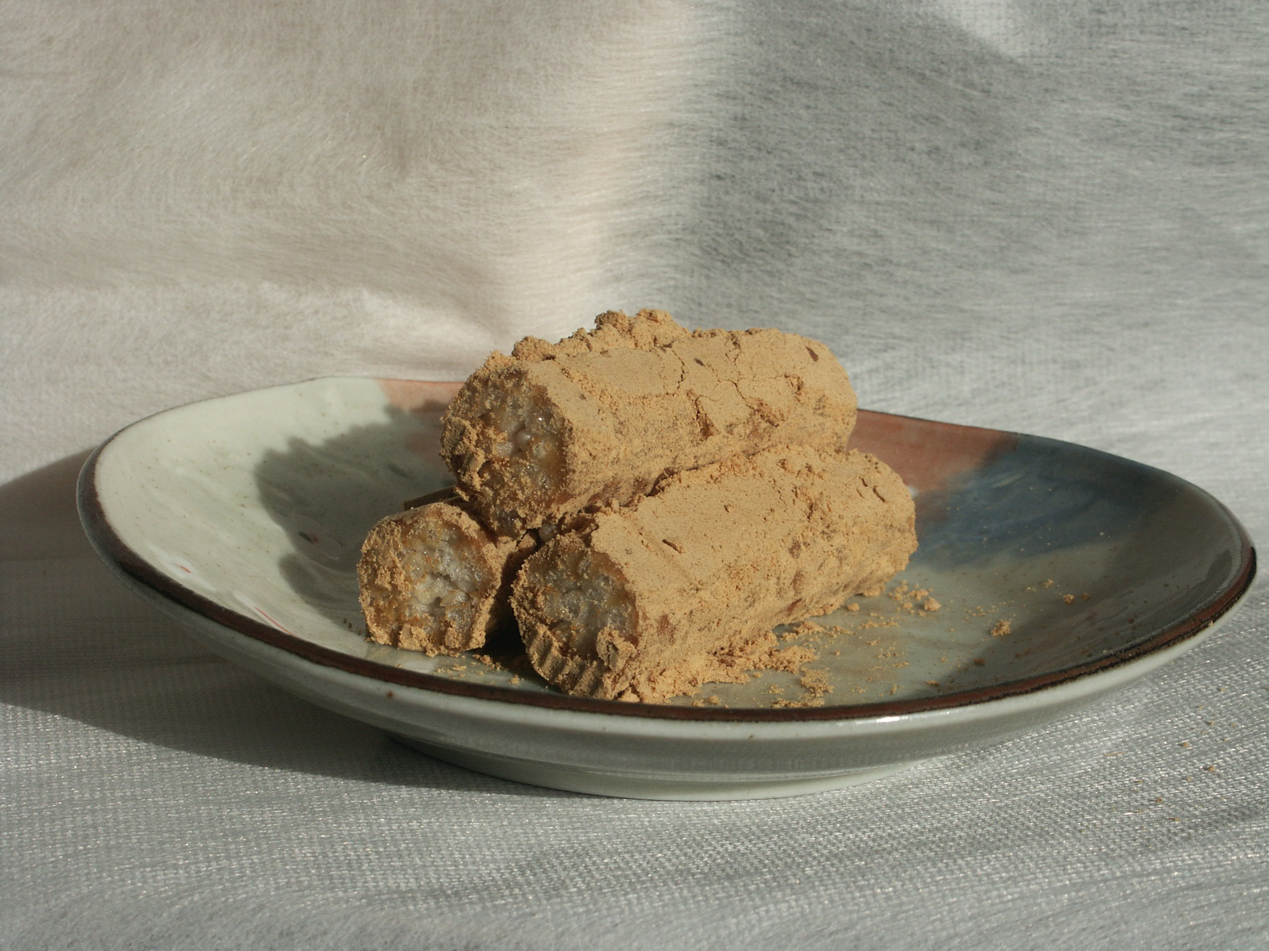 五家宝（皿に盛りつけた状態）